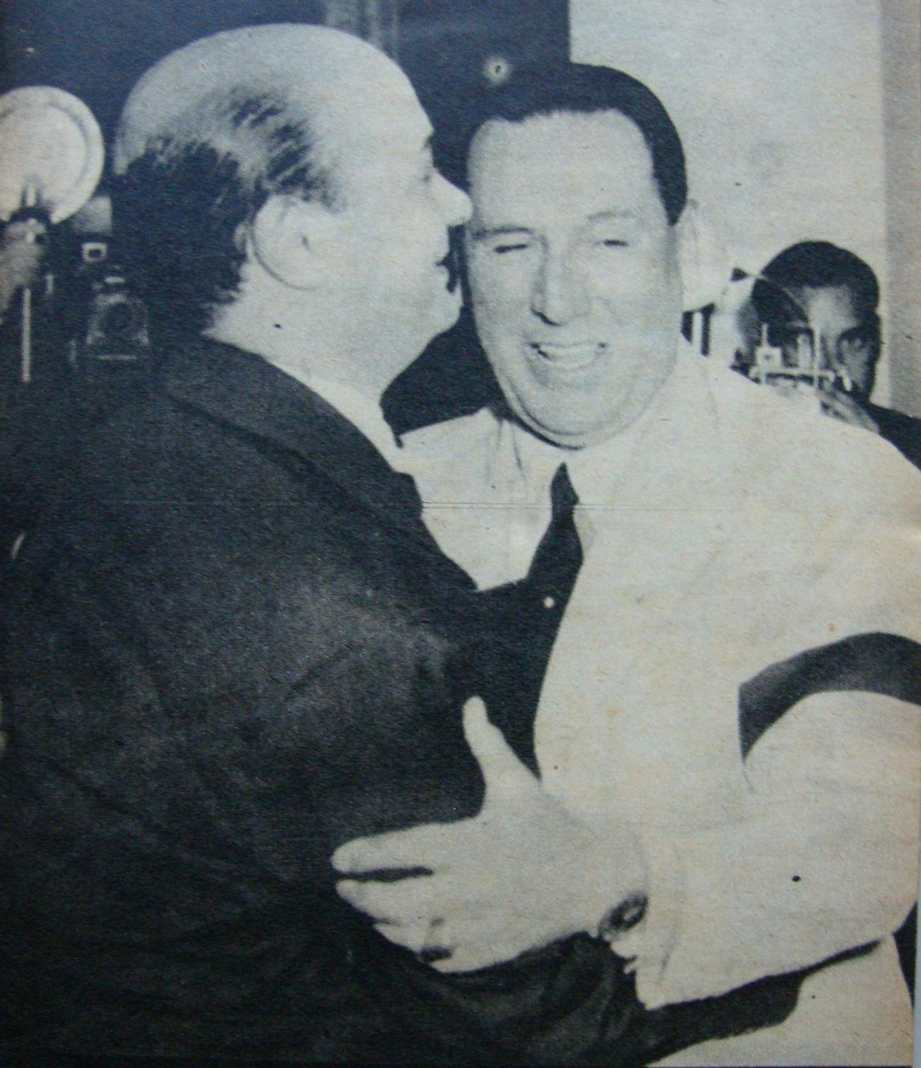 Cástulo Castillo (izquierda) saluda al Presidente Juan Domingo Perón (a la derecha, con brazalete de luto por la muerte de su esposa Evita), luego dar una disertación sobre "Un teatro argentino para la Nueva Argentina" en la Unidad Básica Cultural Eva Perón